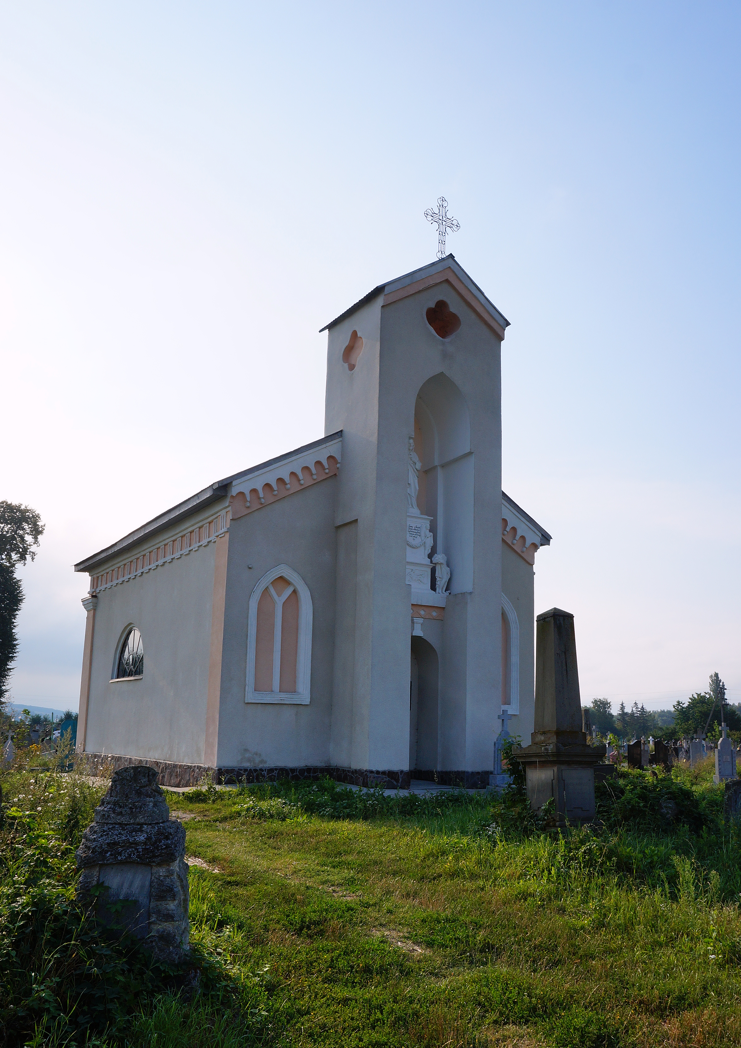 Каплиця-усипальниця Скарбеків-Яблоновських, Бурштин, вул. Бандери, цвинтар